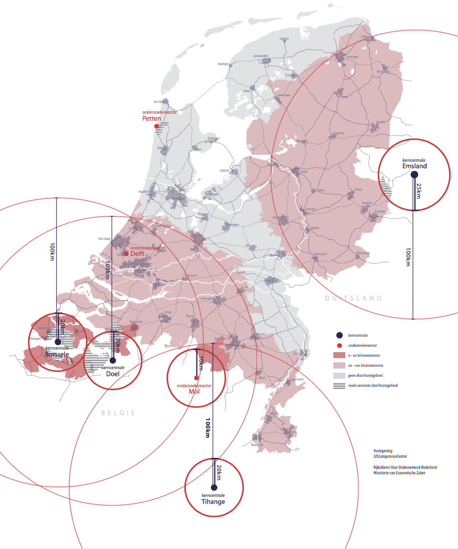 Distributiegebieden jodiumtabletten (oktober 2017) Nederland.